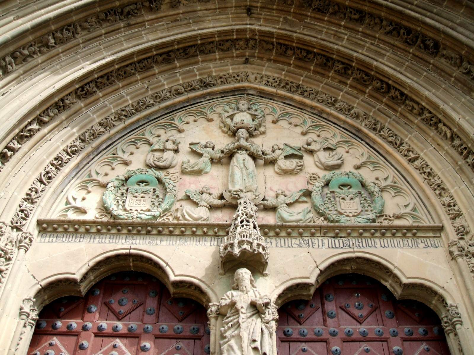 iglesia de San Pablo, Úbeda